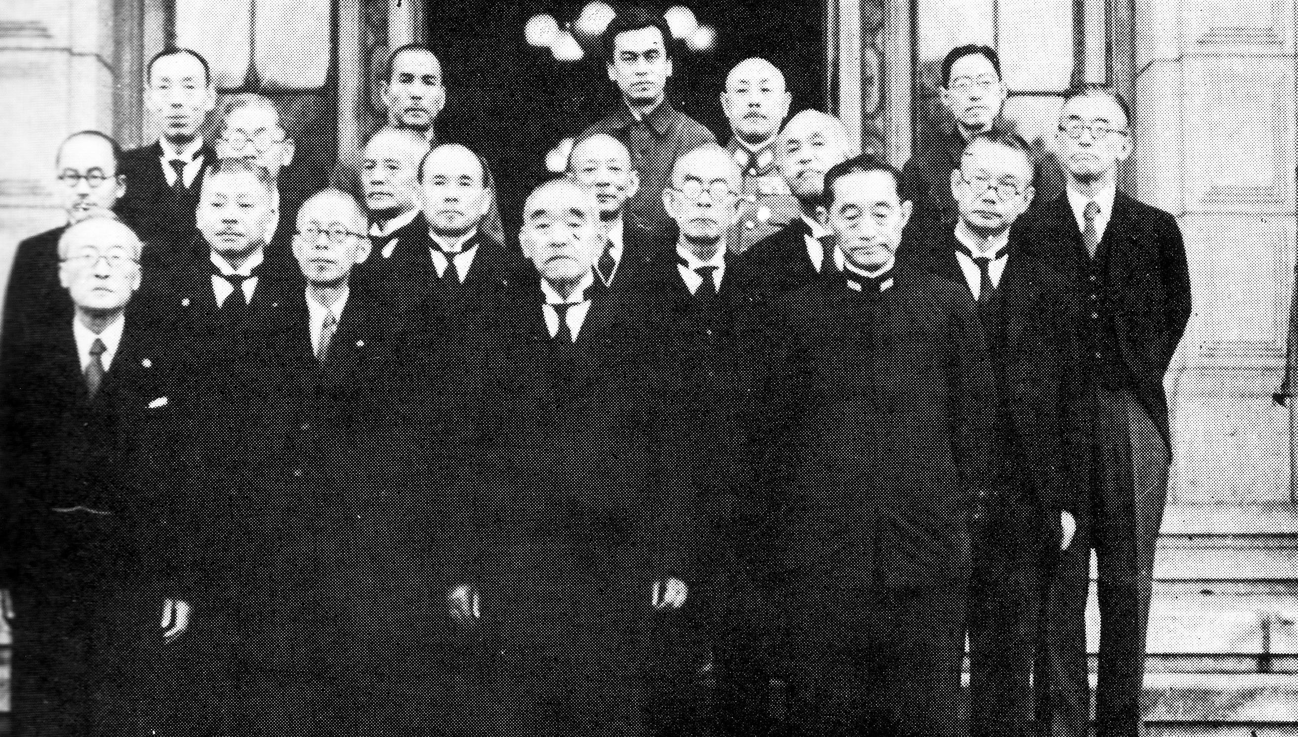 Captions available at File:Suzuki cabinet.svg. The cabinet of Japanese prime minister Kantaro Suzuki posing in front of the National Diet Building of Japan. Those pictured are: Tadahiko Okada, Hiromasa Matsuzaka, Kantaro Suzuki, Mitsumasa Yonai, Genki Abe, Heigoro Sakurai, Sadajiro Toyada, Fujihara Yasui, Tadaatsu Ishiguro, Kozo Ohta, Shigenori Togo, Seizo Sakonji, Naoto Kobiyama Hosaku Hirose, Tsukizo Akinaga, Hisatsune Sakomizu, Naoyasu Murase, Korechika Anami